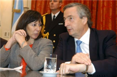 Argentine Economy Minister Felisa Miceli and President Néstor Kirchner.